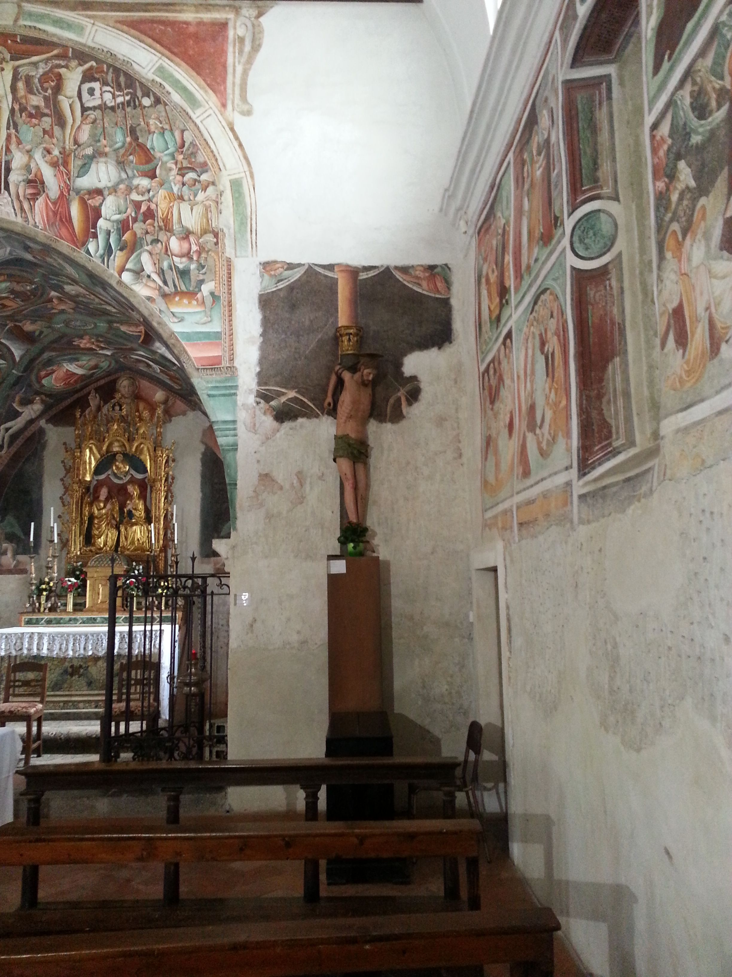 Statua lignea di san Sebastiano opera del XV secolo di Francesco Belinzeri